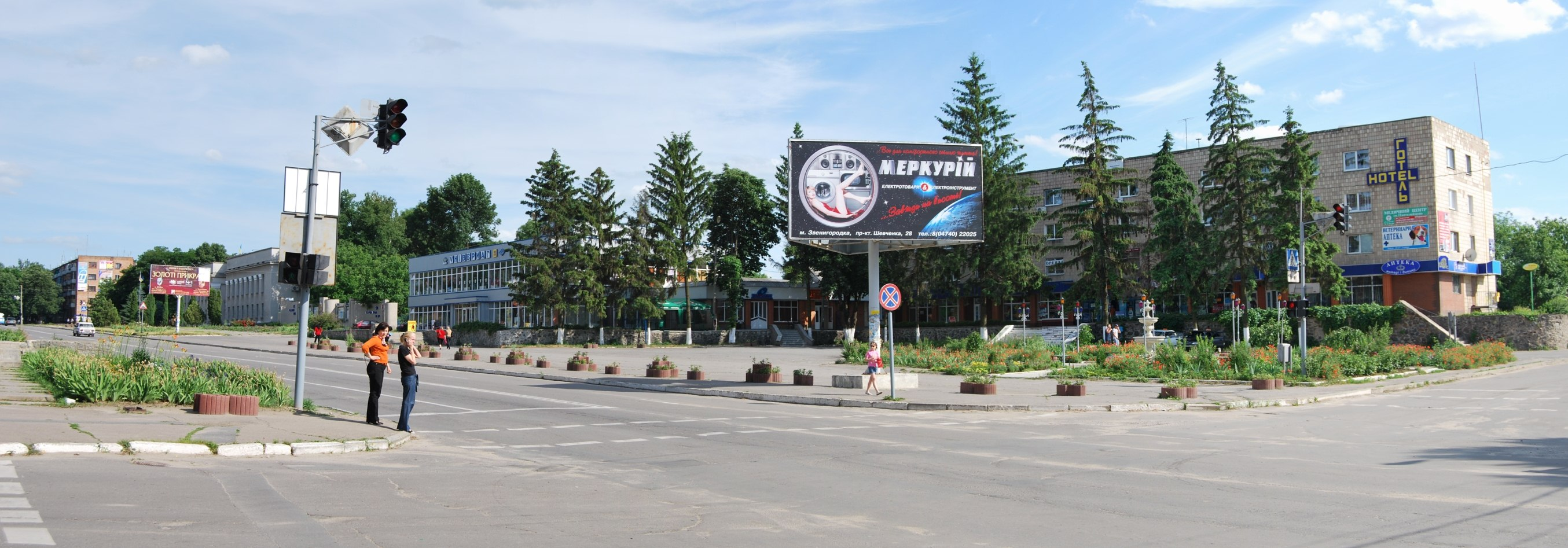 Panorama_zvenygorodka.jpg: Панорама центру Звенигородки